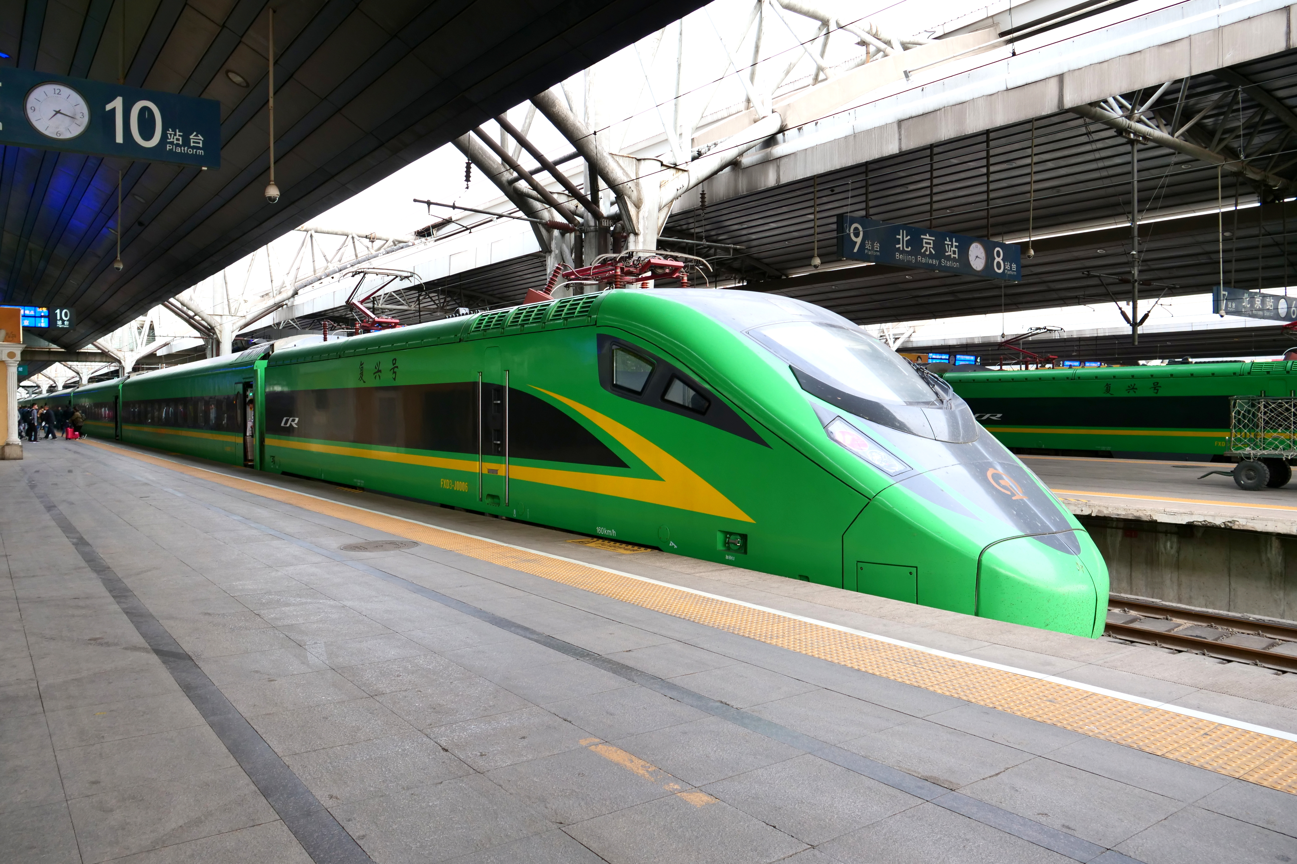 CR200J